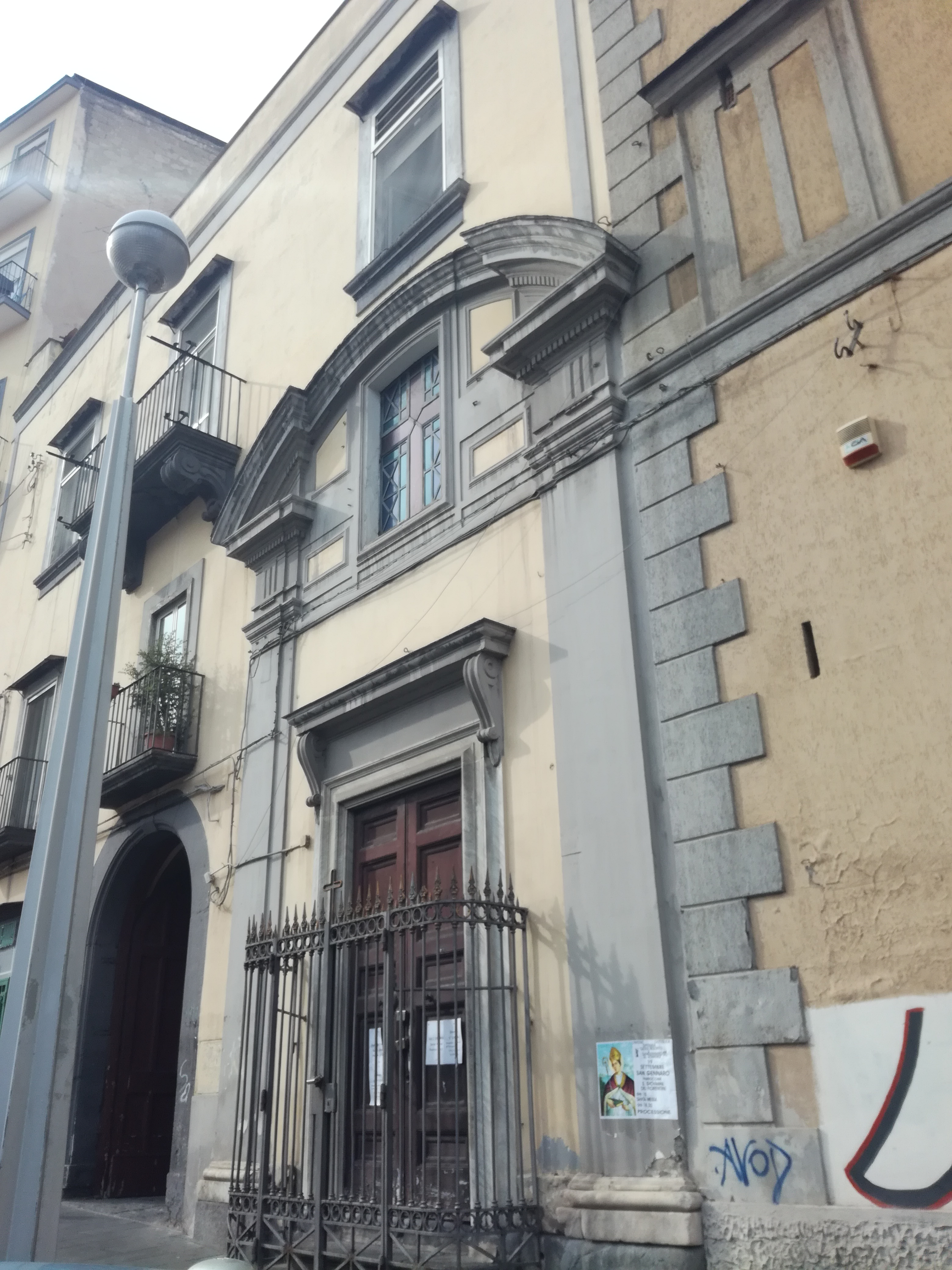 Chiesa di Santa Maria della Purità (Napoli, via Salvator Rosa)